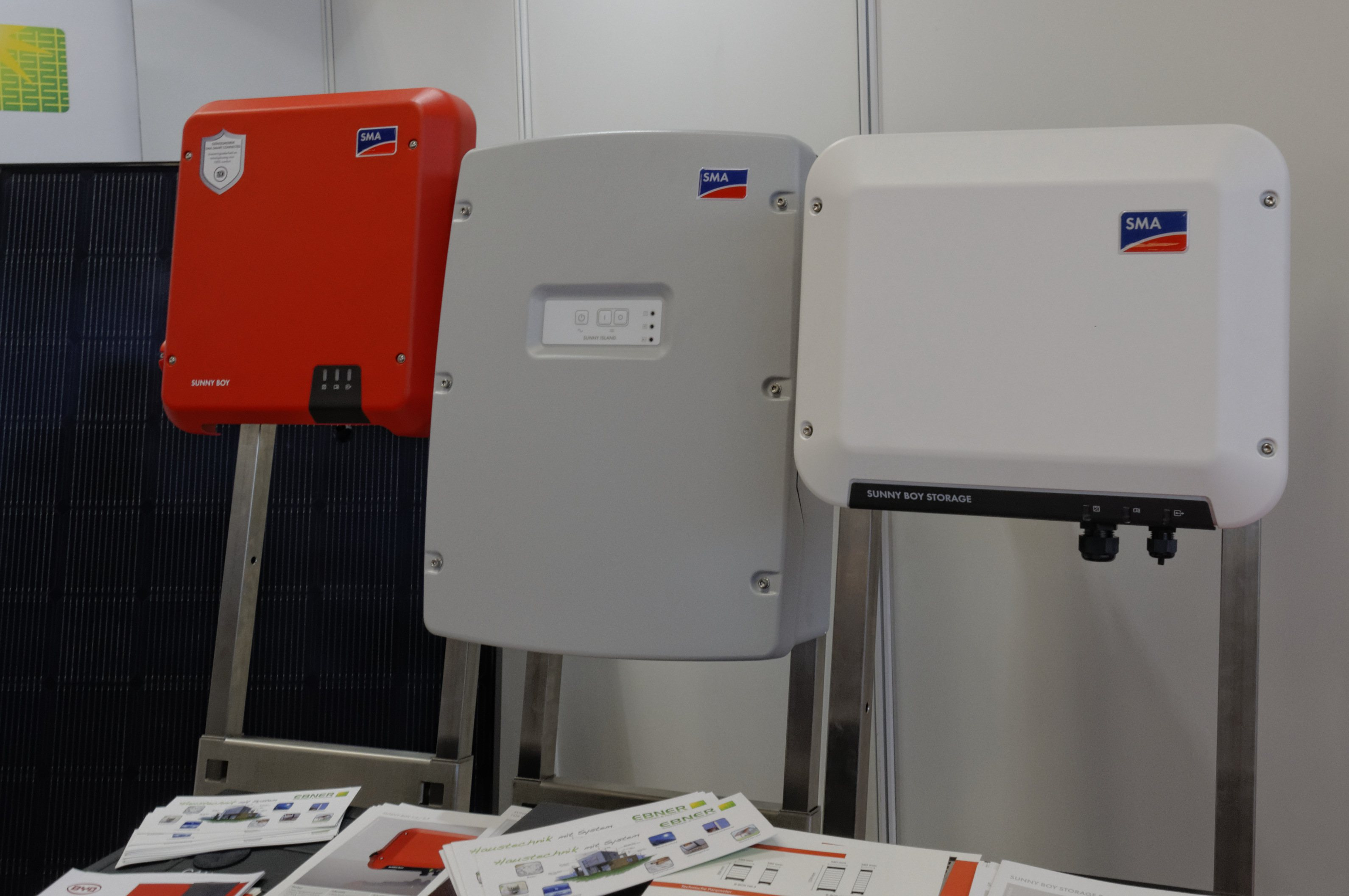 Sindelfingen Haus & Energie 2018